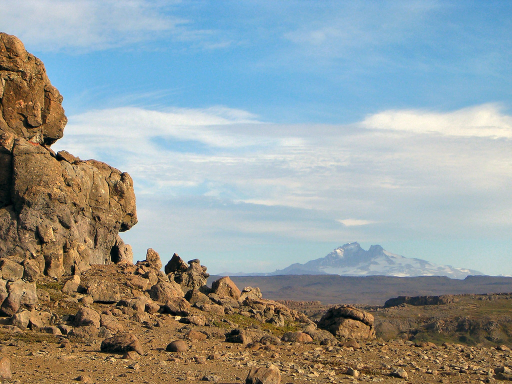 Mont Ross, Kerguelen Islands